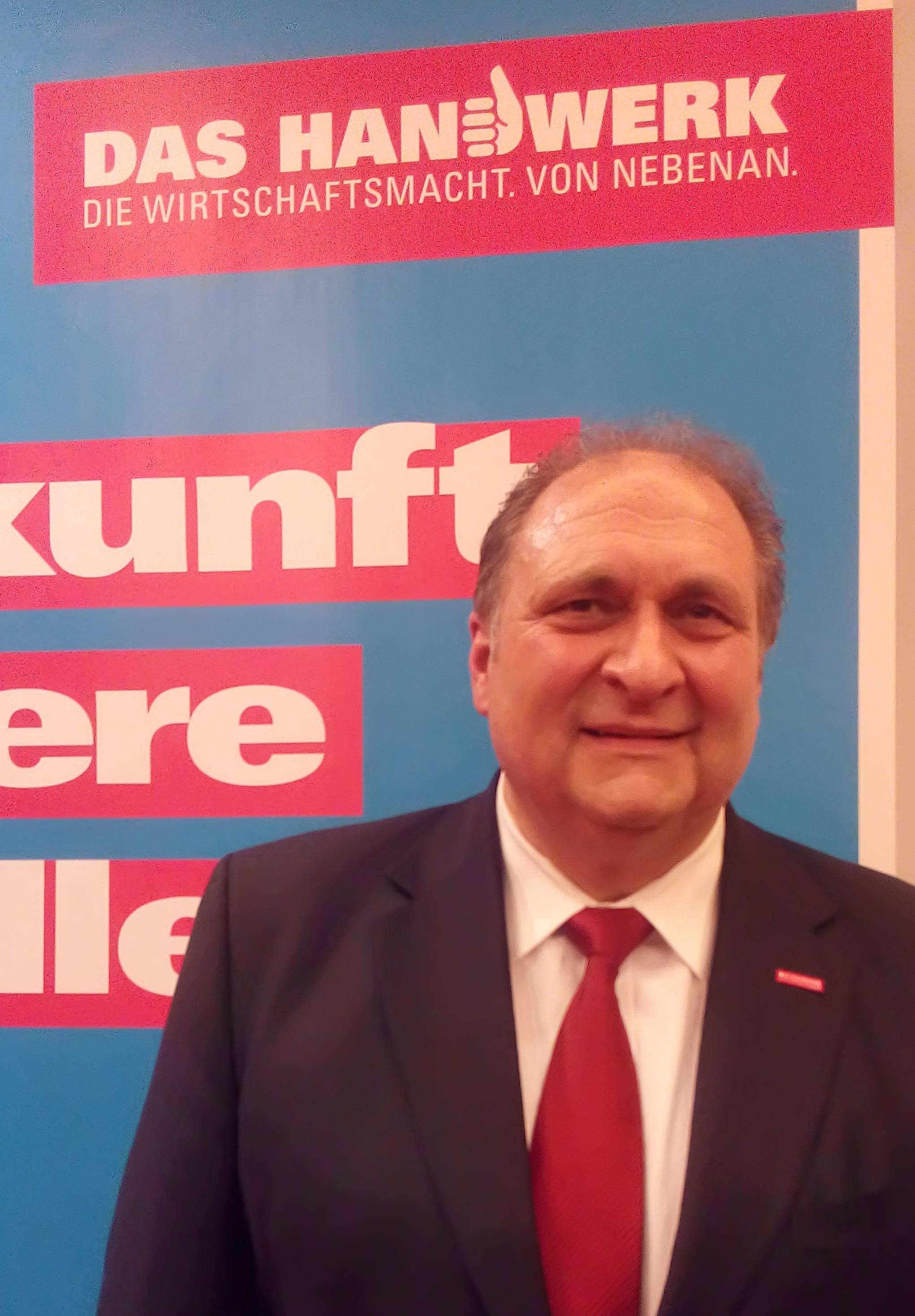 Präsident ZDH